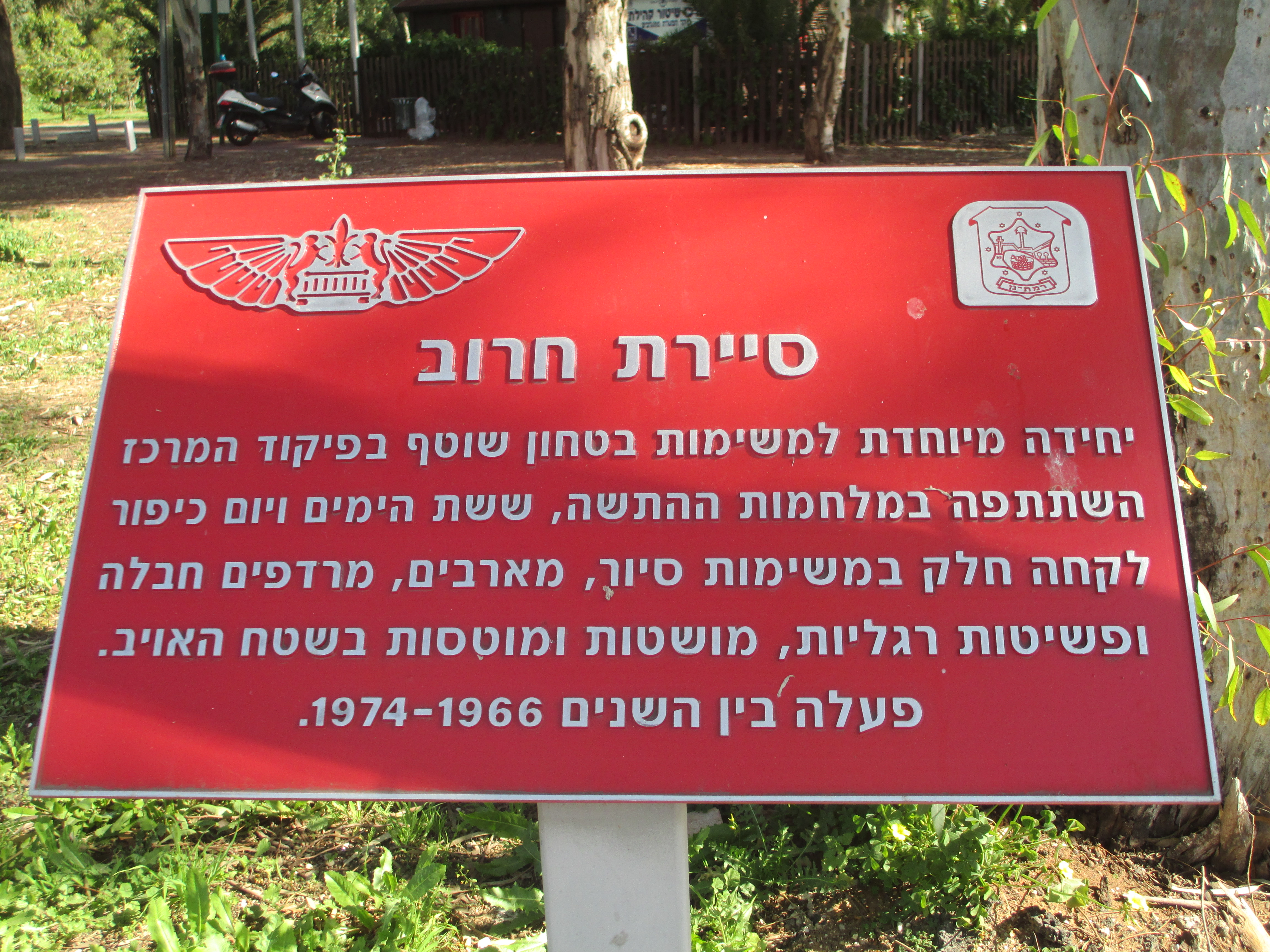 שלט הסבר בכיכר סיירת חרוב ברמת גן